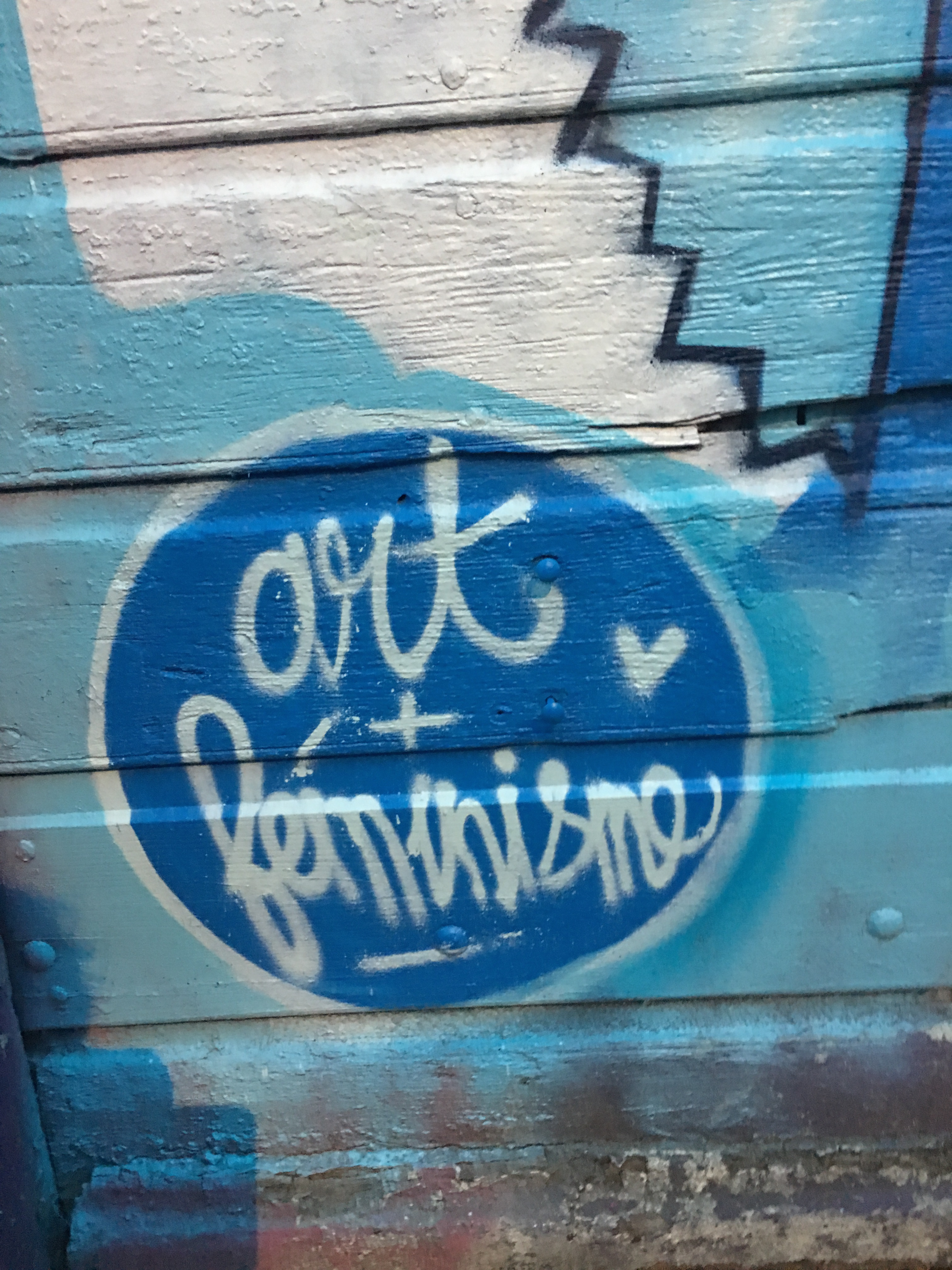 Fresque réalisée par Amikal le 5 mars 2017 en marge de l'editathon Art+Féminisme Genève 2017 devant la bibliothèque du peuple, aux Grottes à Genève